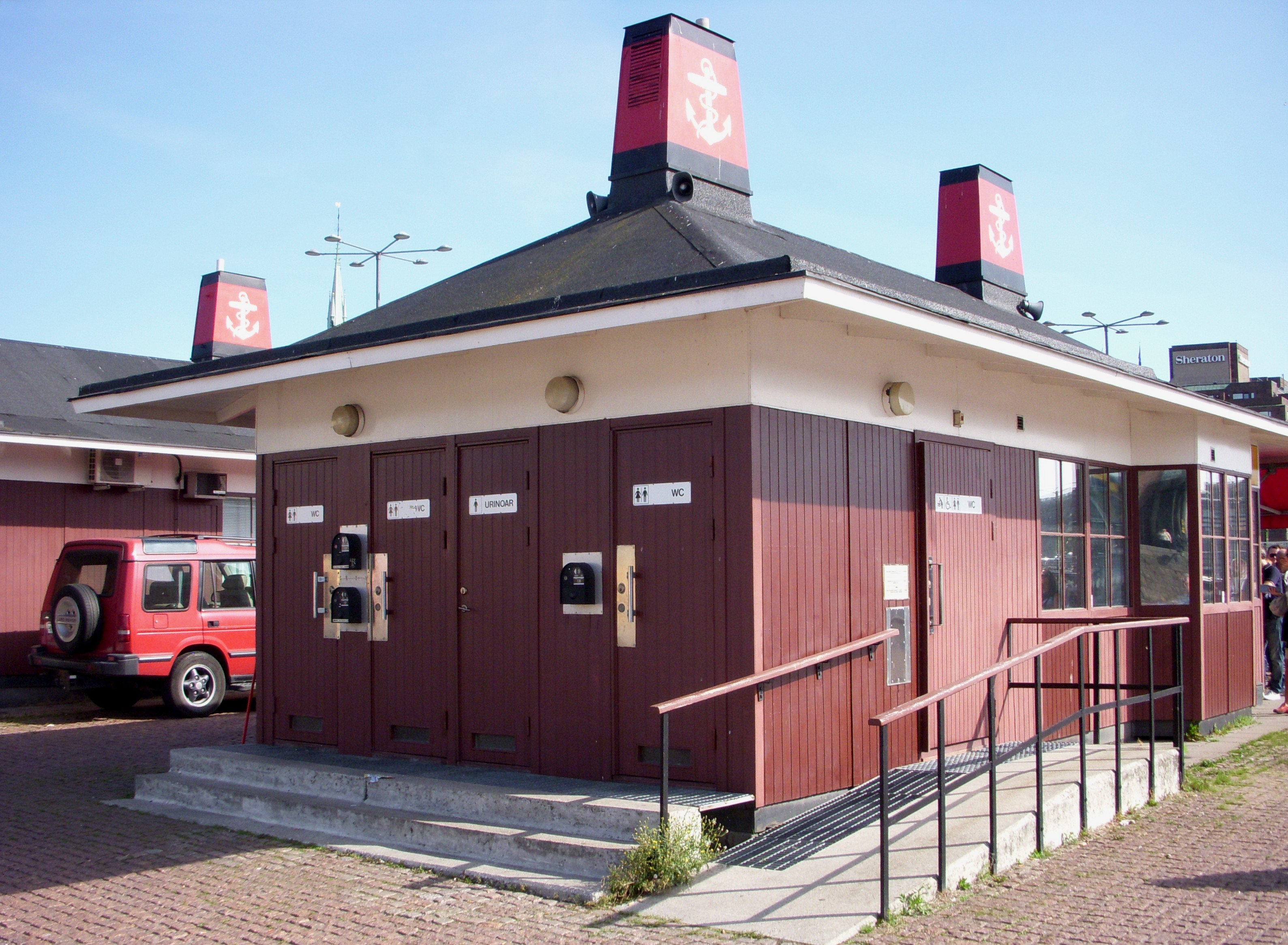 Offentlig toalett vid Stadshuskajen